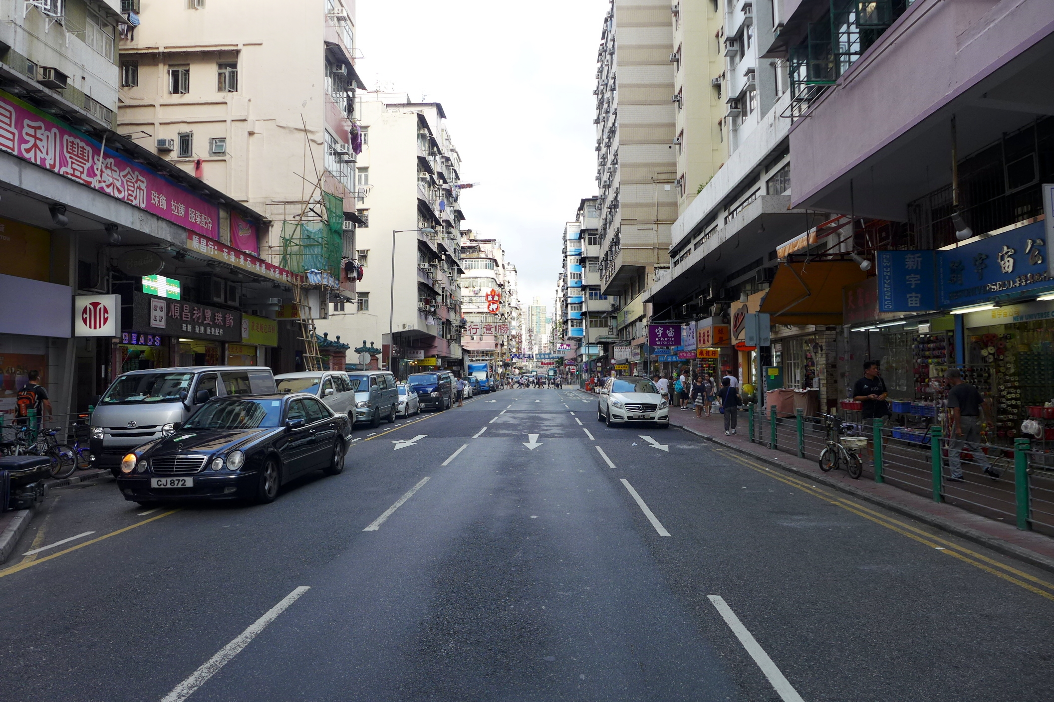 Yu Chau Street